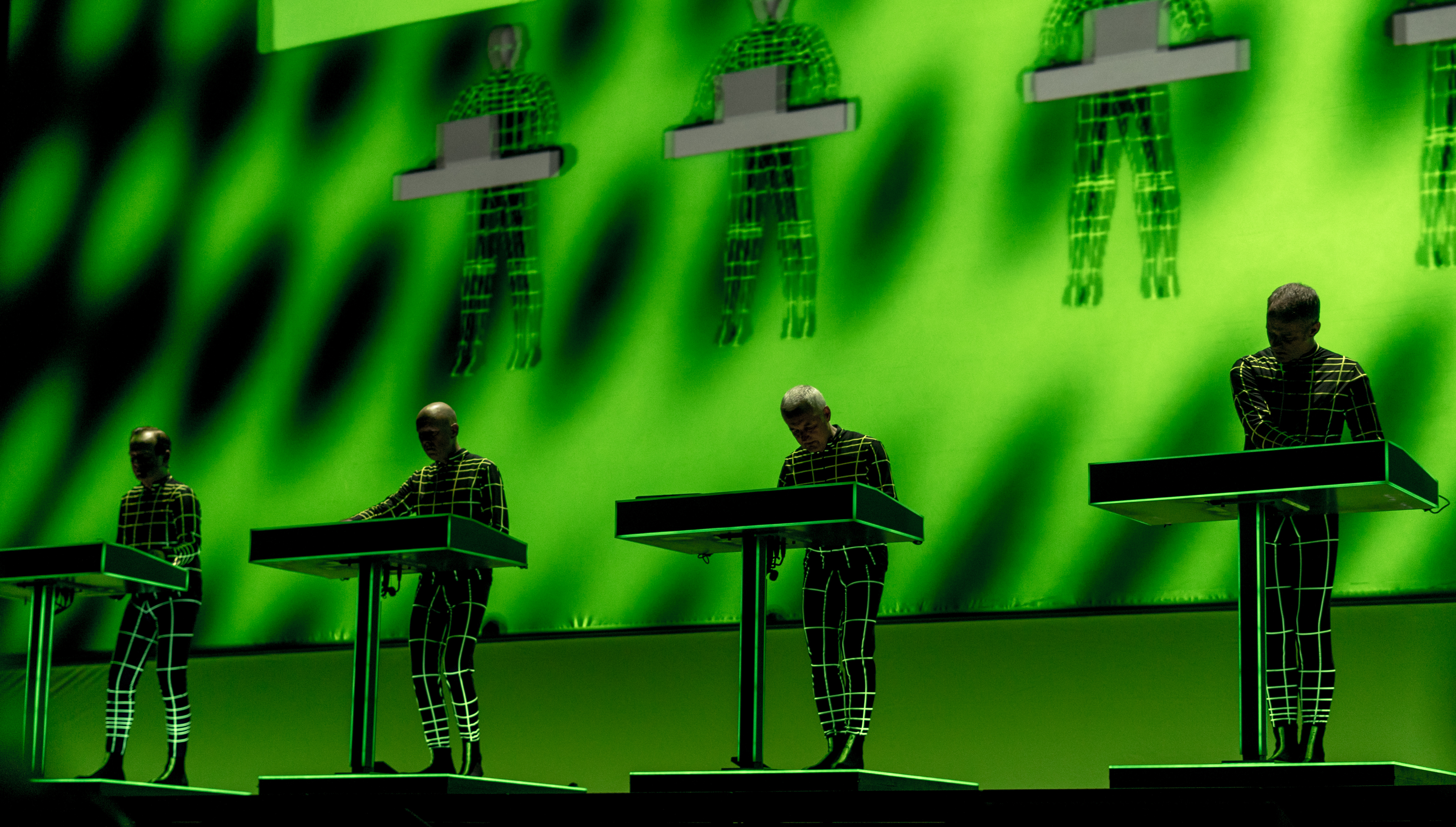 KraftwerkRAH210617-19